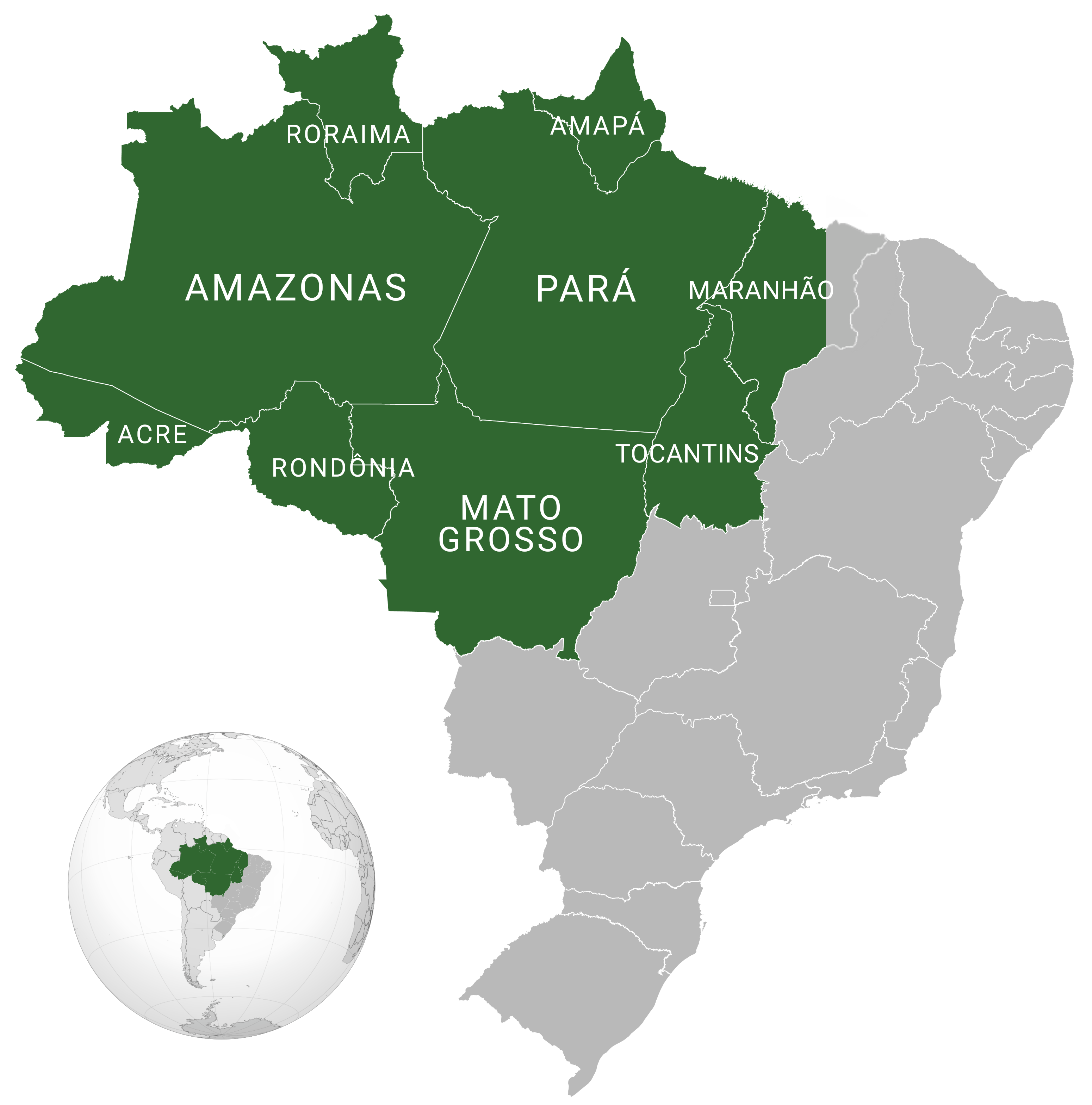 Amazônia Legal as described at Amazônia Legal